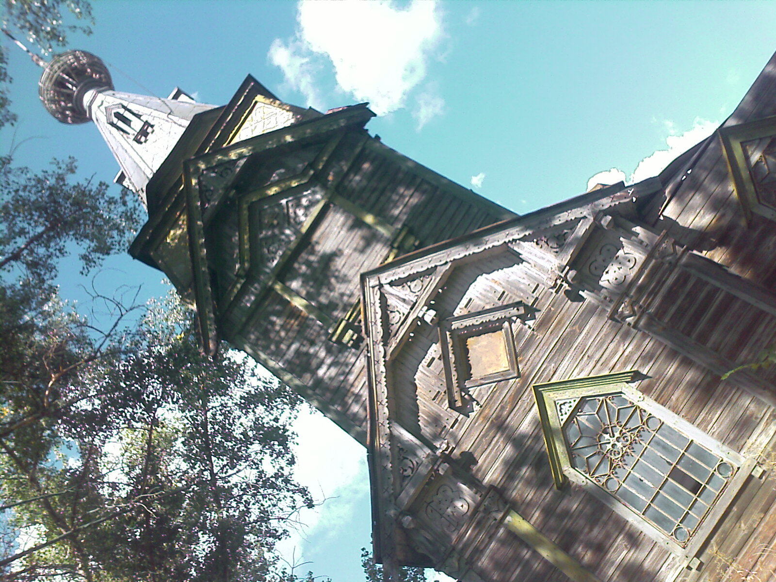 Параскеви П'ятниці св. церква 1891 року в Бакирівці. Дзвіниця